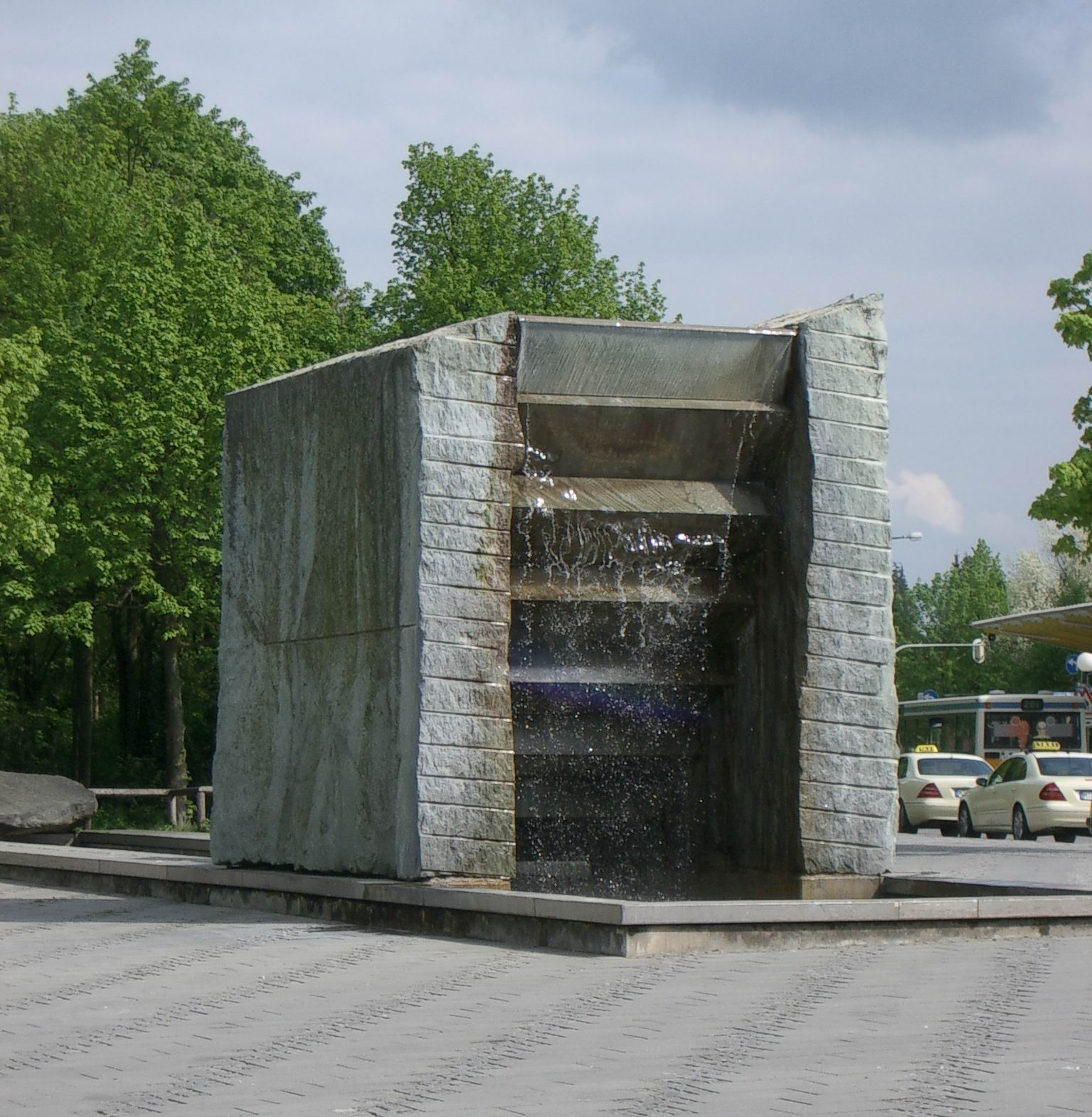 Brunnen in Fürstenried-West (selbst Fotografiert) von Benutzer:Morray